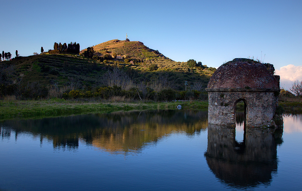 Cupola Rosata. Rodi' Milici